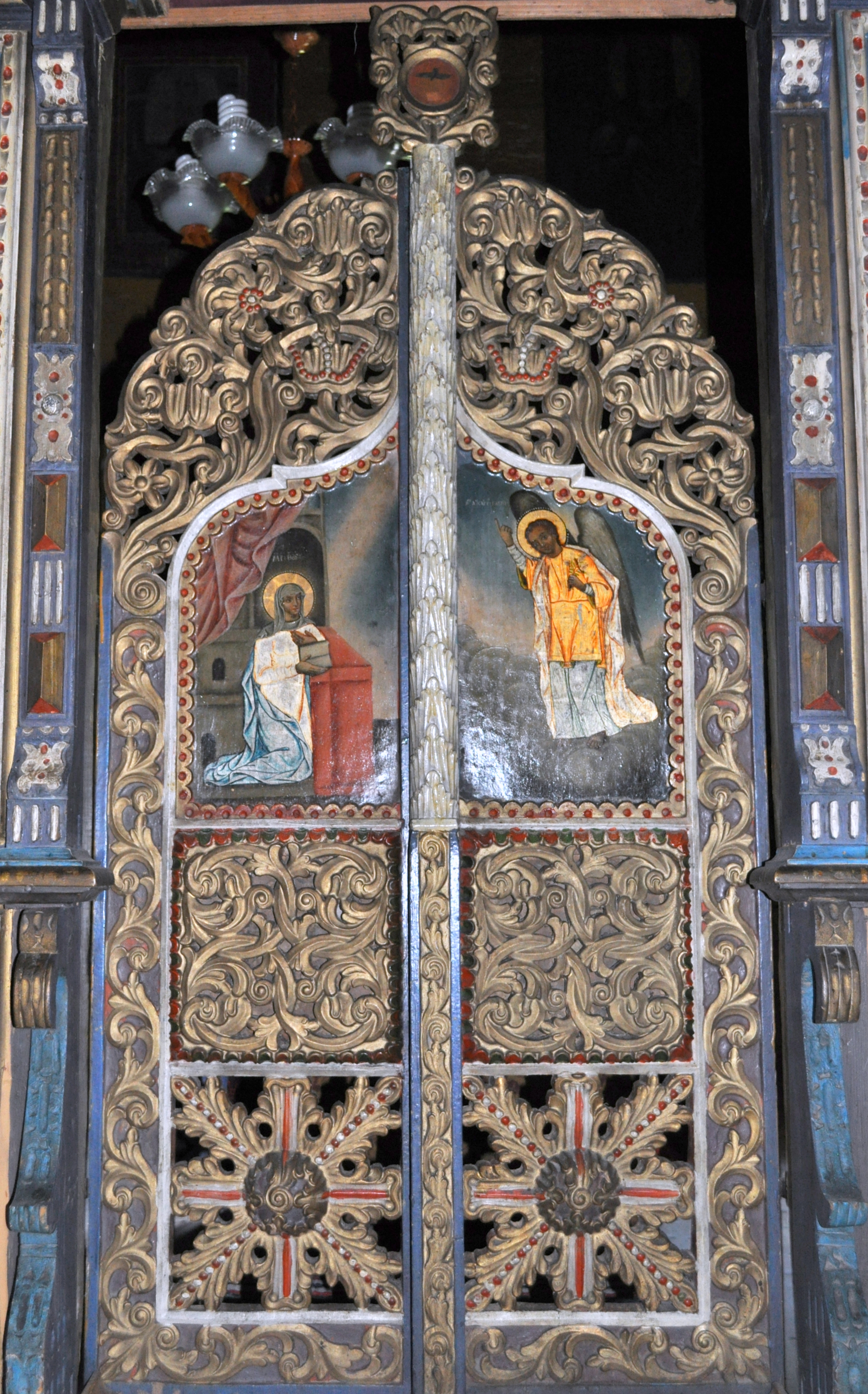 Biserica de lemn „Cuvioasa Paraschiva” din satul Valea Sării, județul Vrancea